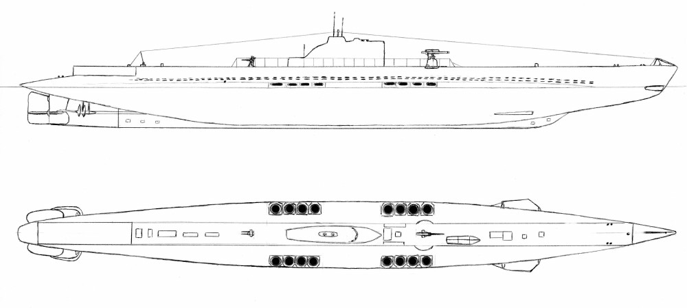 Подводный минный заградитель французского флота "Рюби"